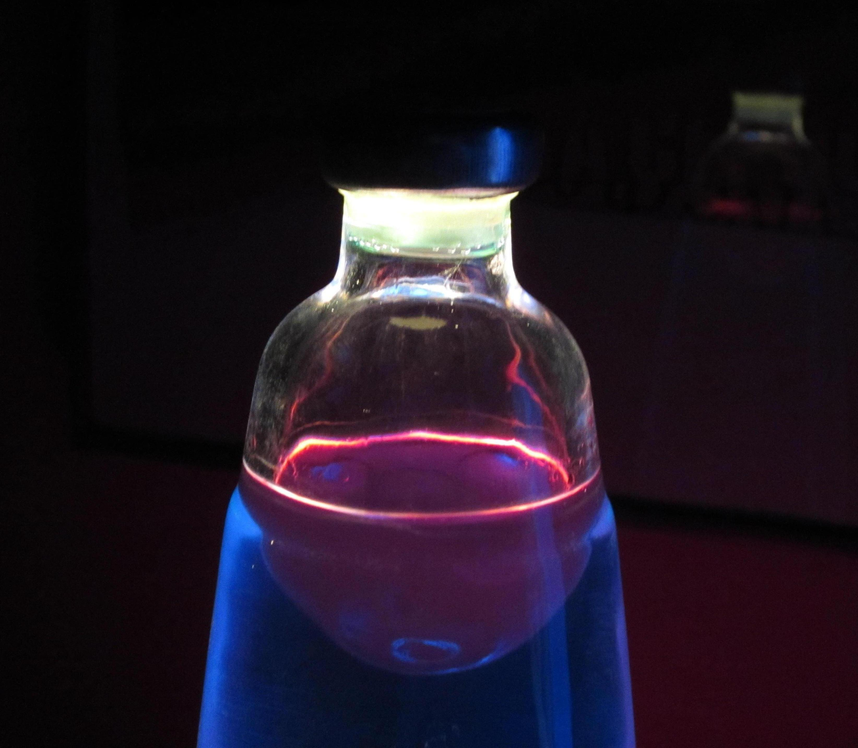 Spazio vuoto lasciato appositamente per favorire la dilatazione del liquido.